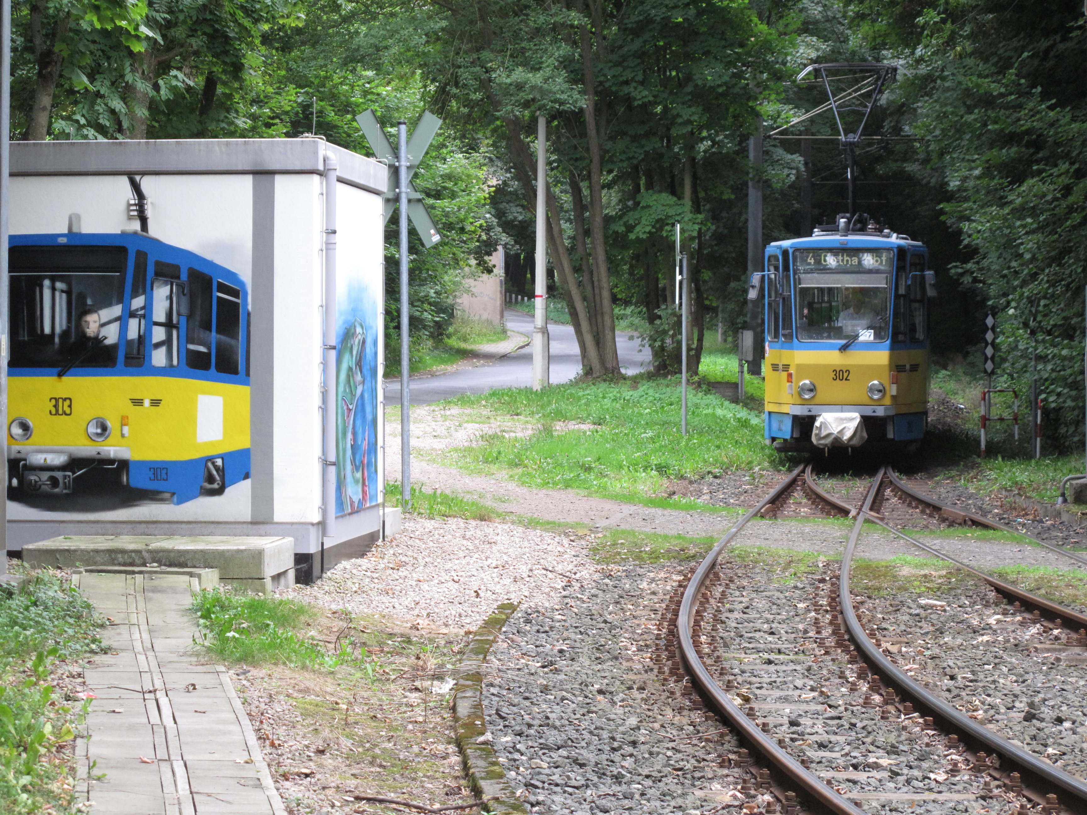 Wagen 302 und bemalte Trafostation daneben